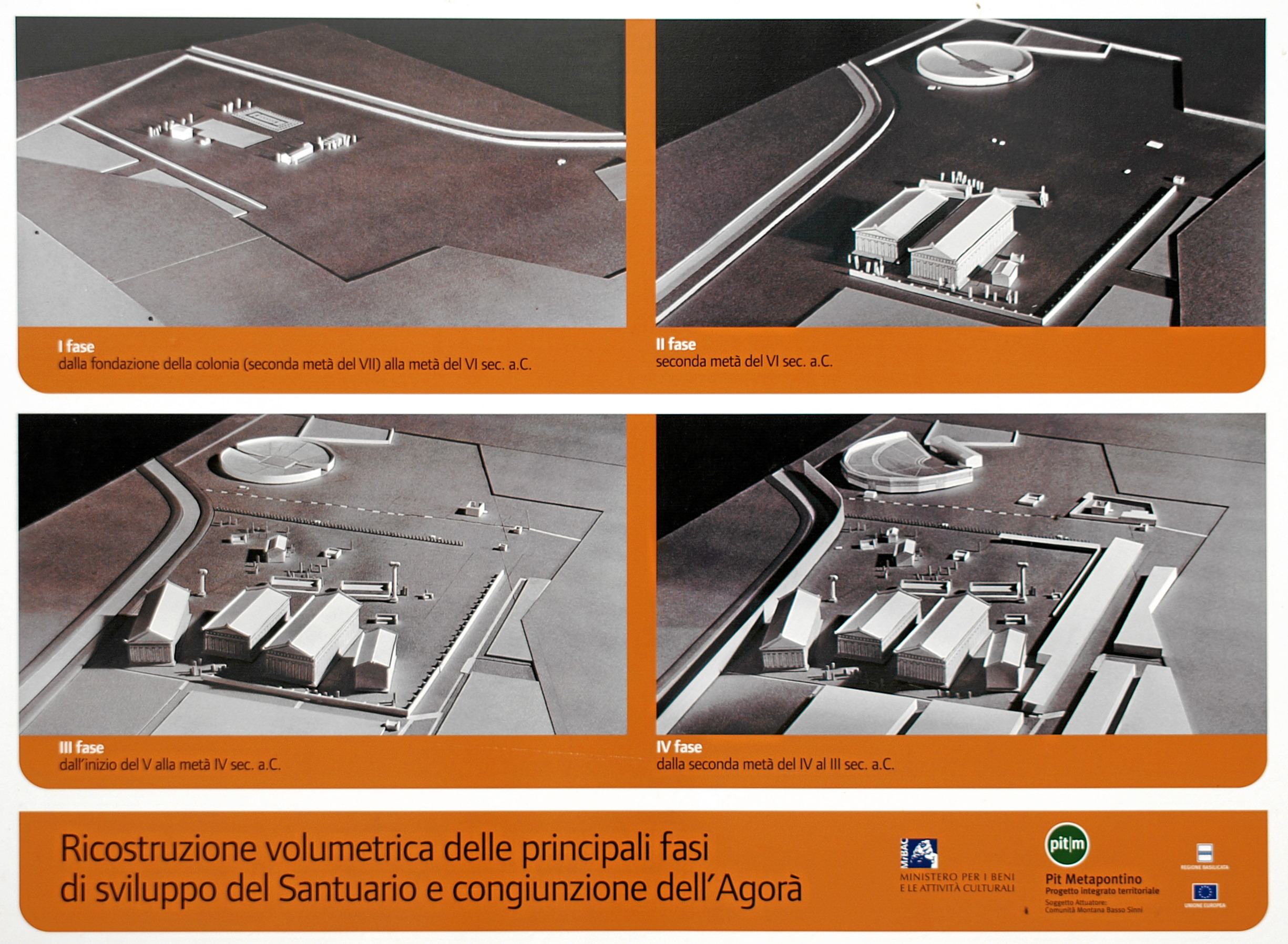 Metaponto: Rekonstruktion der Tempel